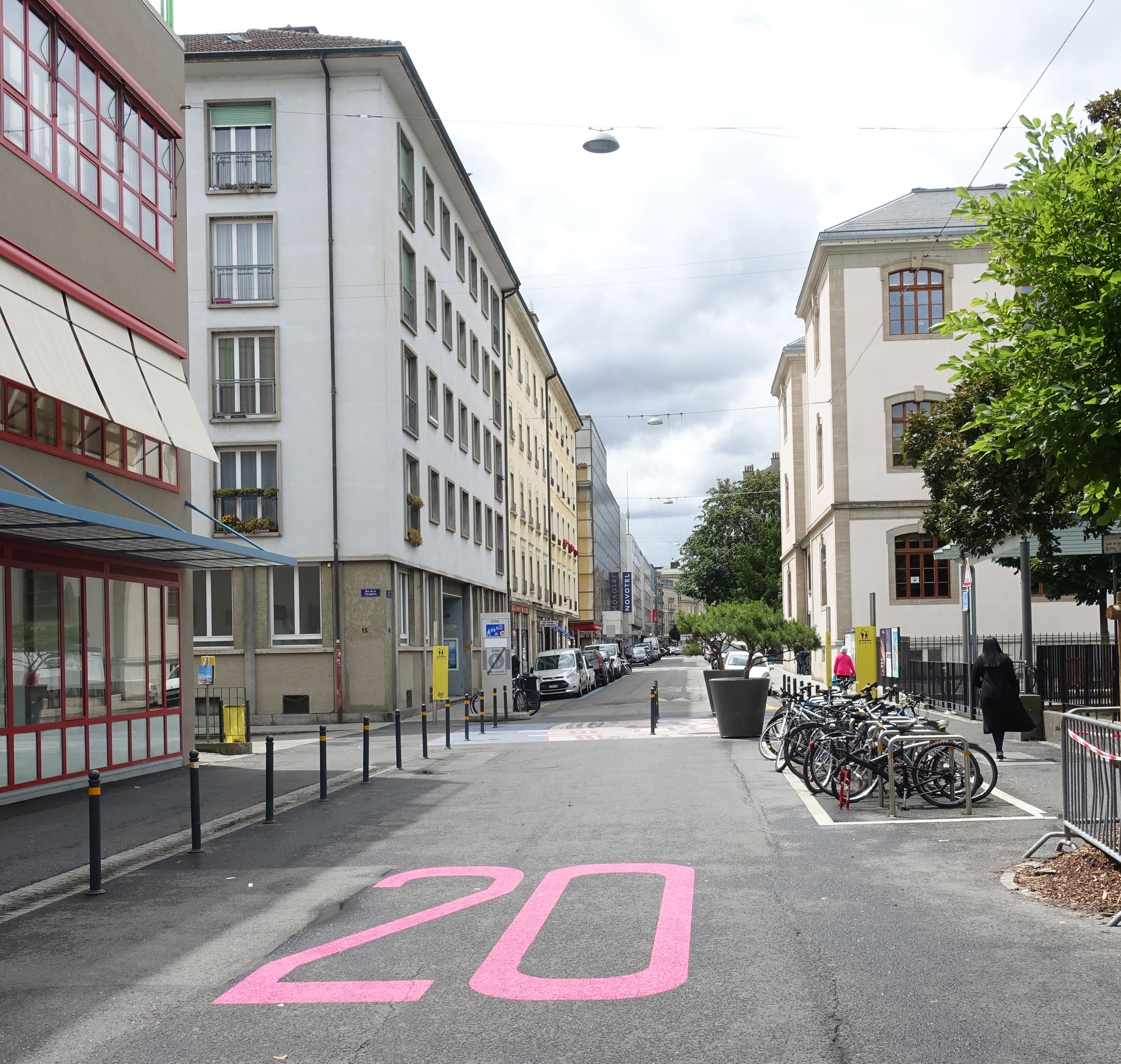 Transformation de la rue de Berne en « zone de rencontre », dans le quartier des Pâquis à Genève, dans le contexte du déconfinement COVID-19. La signalisation liée à la limitation à 30 km/h est effacée, remplacée par une signalisation constituée de panneaux aux accès (zone de rencontre 20 km/h et panneau ad hoc), et au sol de grands « 20 » peints et des carré collés représentant la zone de rencontres sur fond rose. Des potelets qui rendent la chaussée plus étroite sont installés en certains lieux.